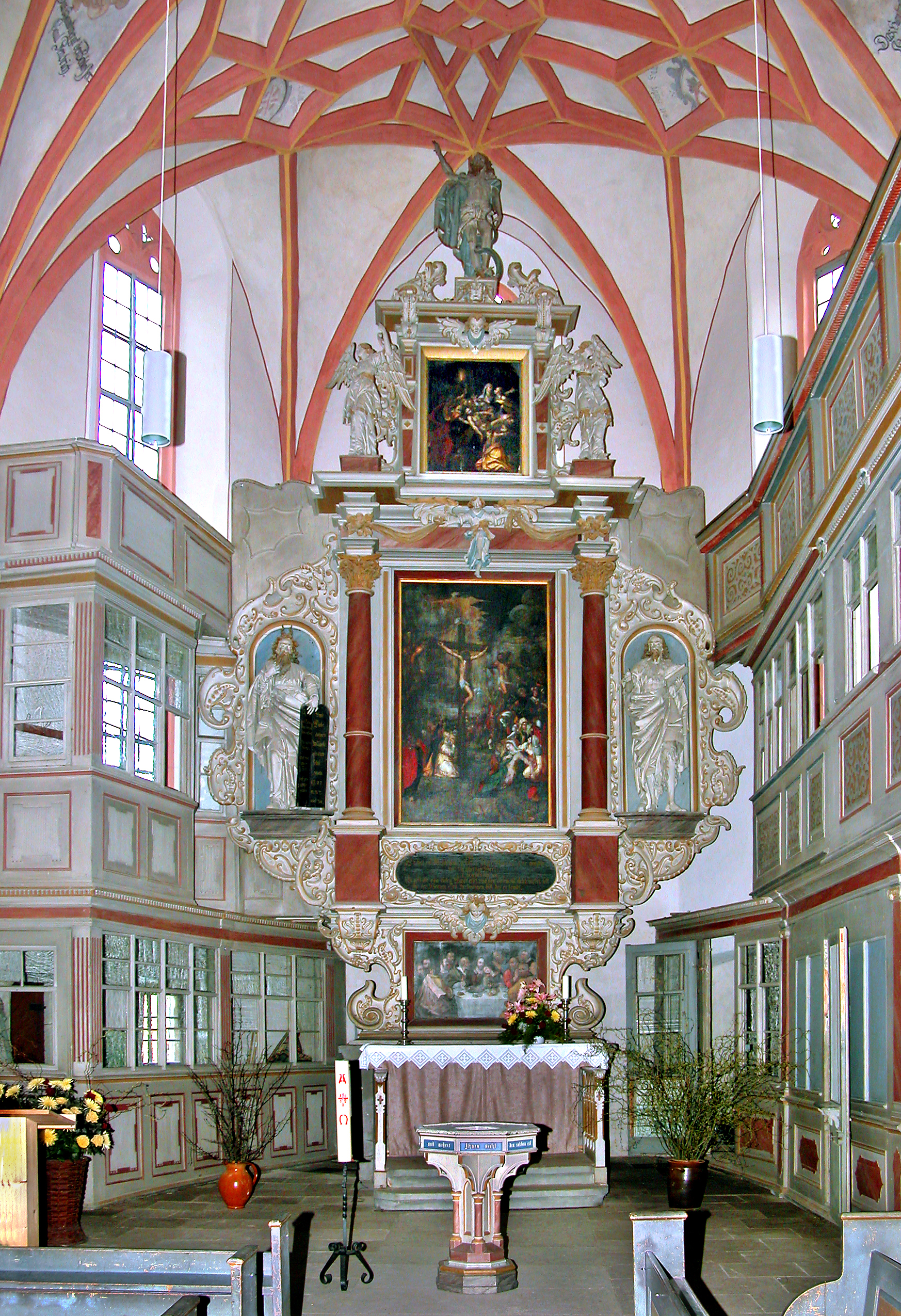 10.04.2009 04874 Belgern (Belgern-Schildau), Kirchgasse (GMP: 51.484091,13.127551: St. Bartolomäus Kirche. 1267 erstmals erwähnt, erhielt die St. Bartholomäus Kirche 1509 bis 1512 ihre heutige Gestalt. Altaraufsatz (Kreuzigungsgemälde) 1660. [DSCN36231.TIF]20090410705DR.JPG(c)Blobelt